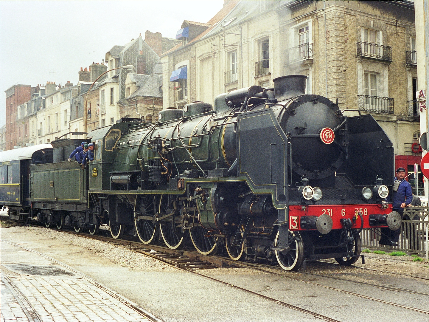 La 231 G 558 arrive en gare de Dieppe-Maritime le 14 septembre 1986.